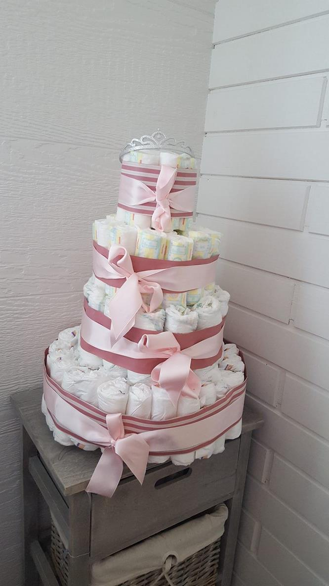 Dette er et bilde av typisk bleiekake. Kaken er oppbygd av bleier og pyntet med rosa silkebånd.